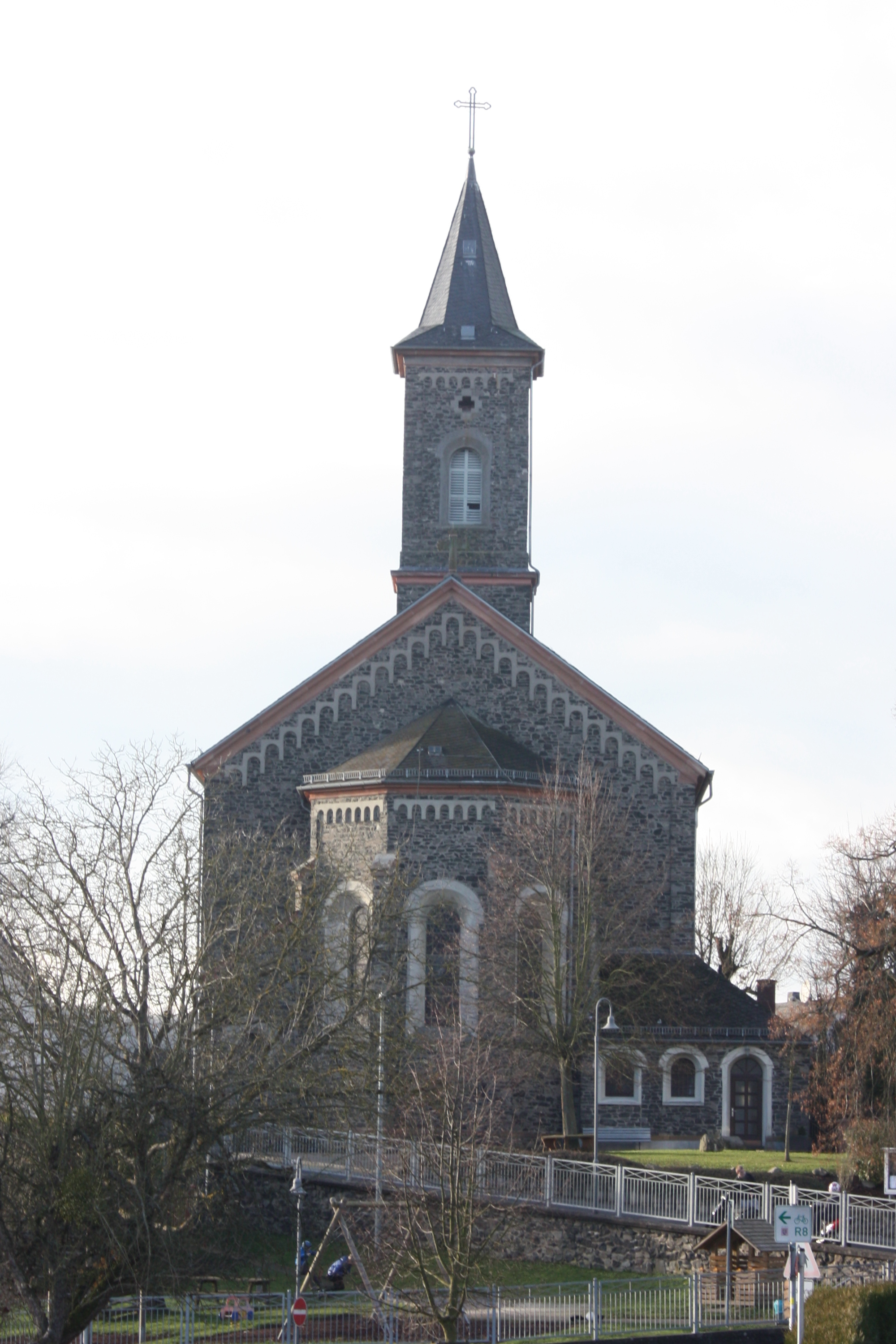 Waldbrunn (Westerwald): Kirche St. Maximinus in Ellar